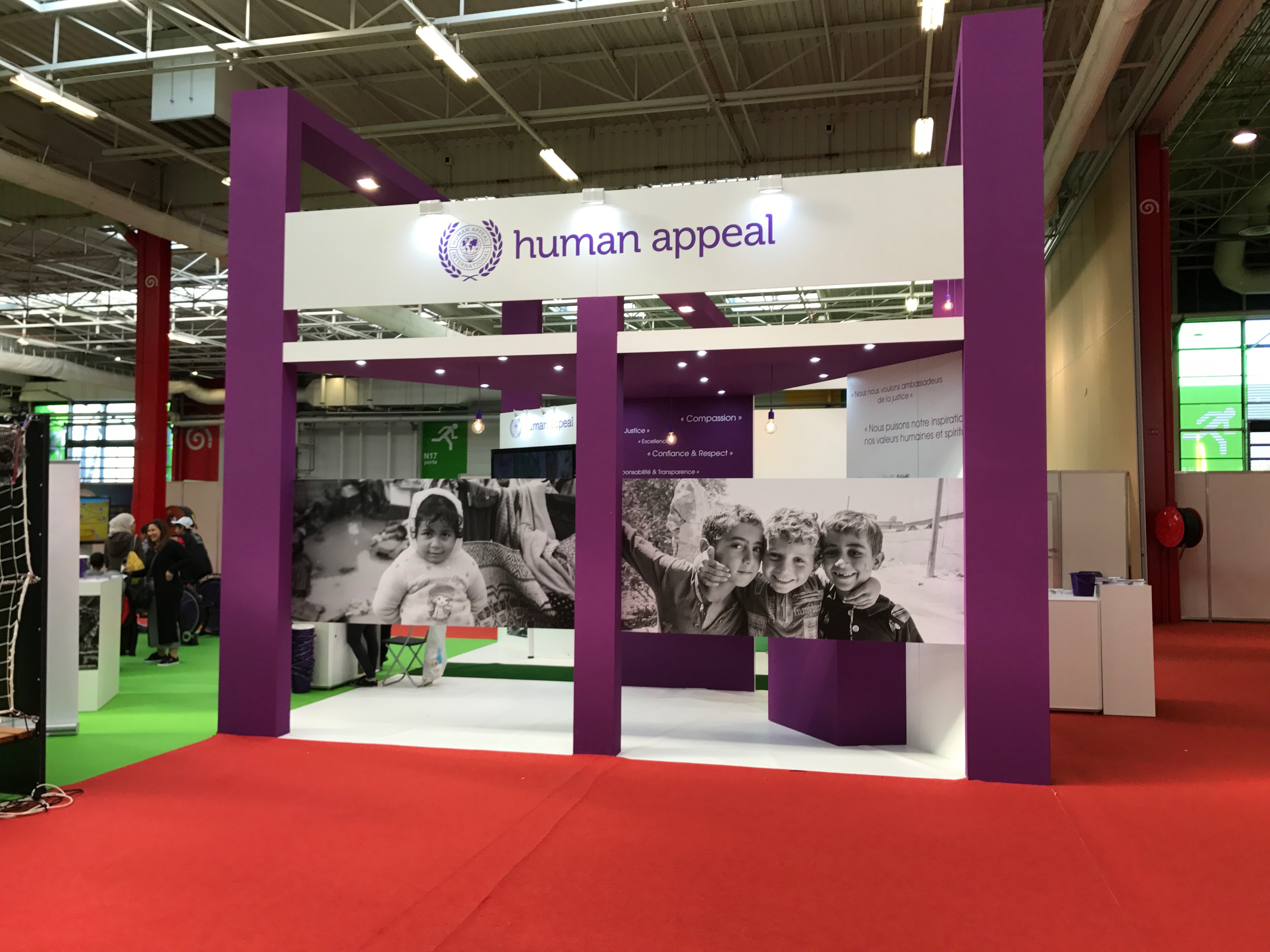 Stand Human Appeal, Rencontre annuelle des musulmans de France, avril 2017, Paris Le Bourget.